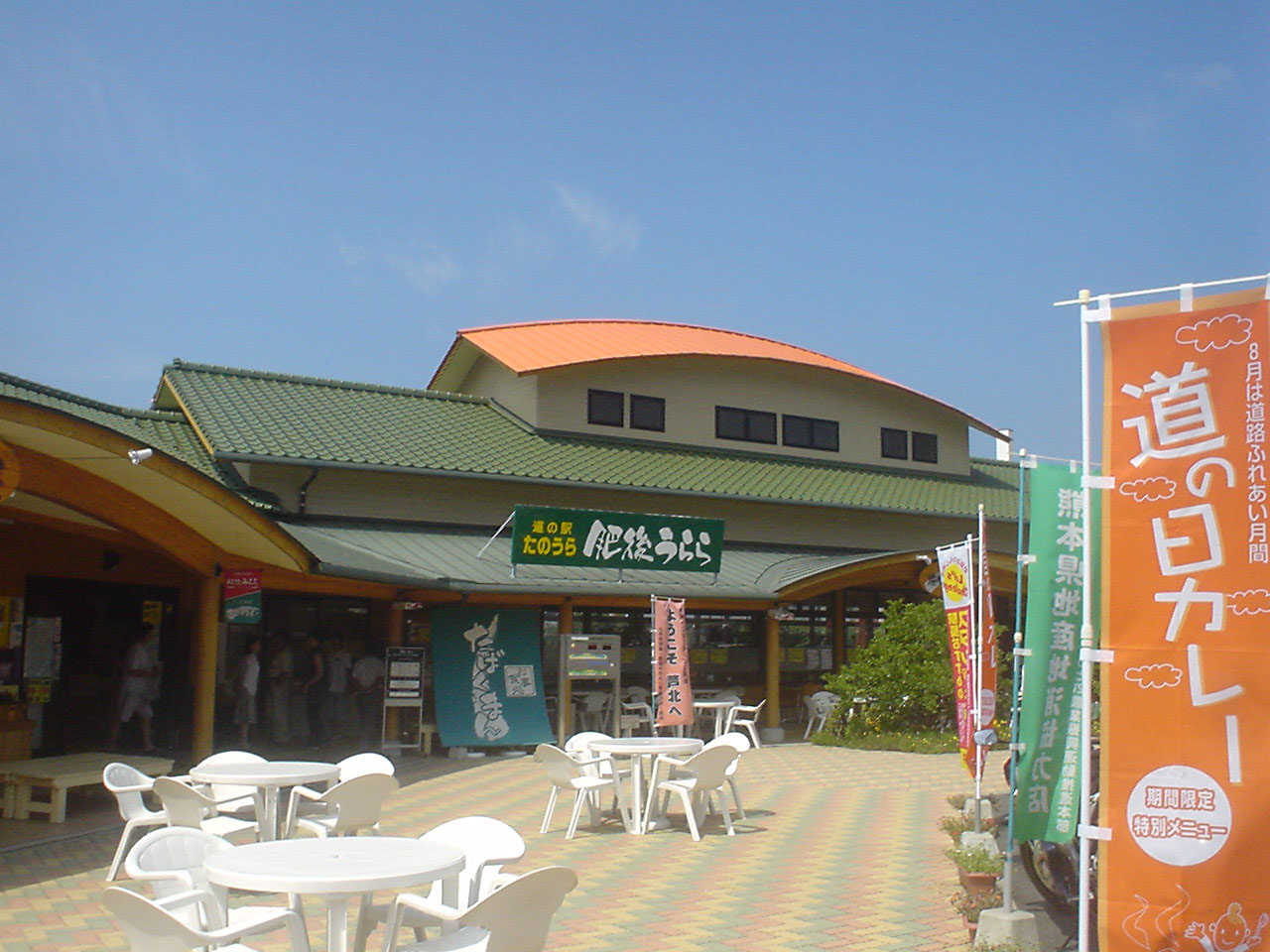 道の駅 たのうら（熊本県葦北郡芦北町田浦）